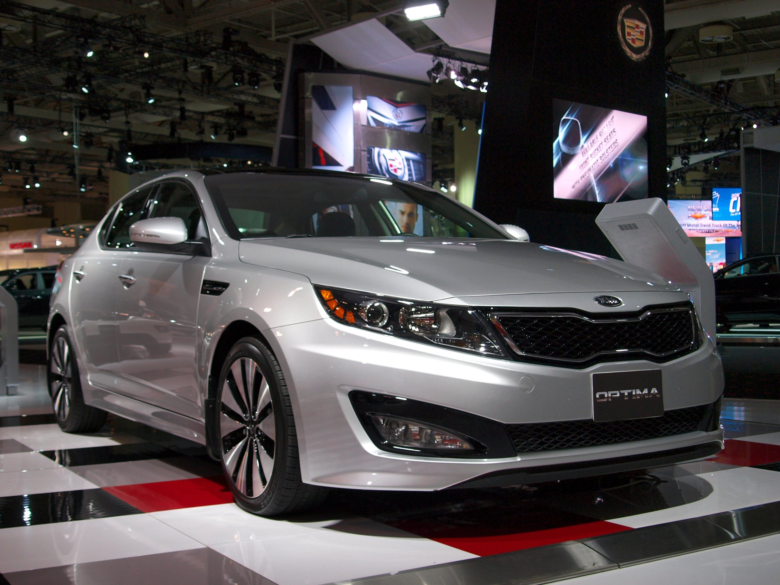 2011 KIA Optima